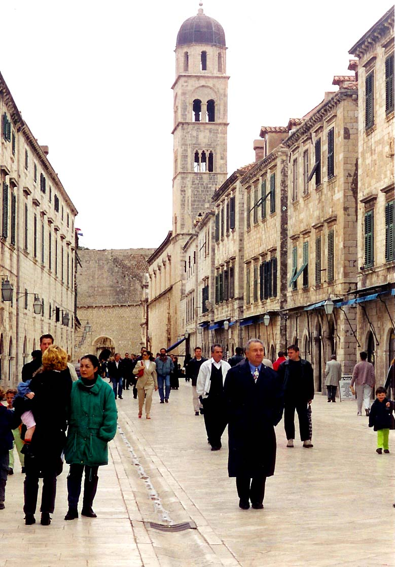 Haaptstrooss vu Dubrovnik.